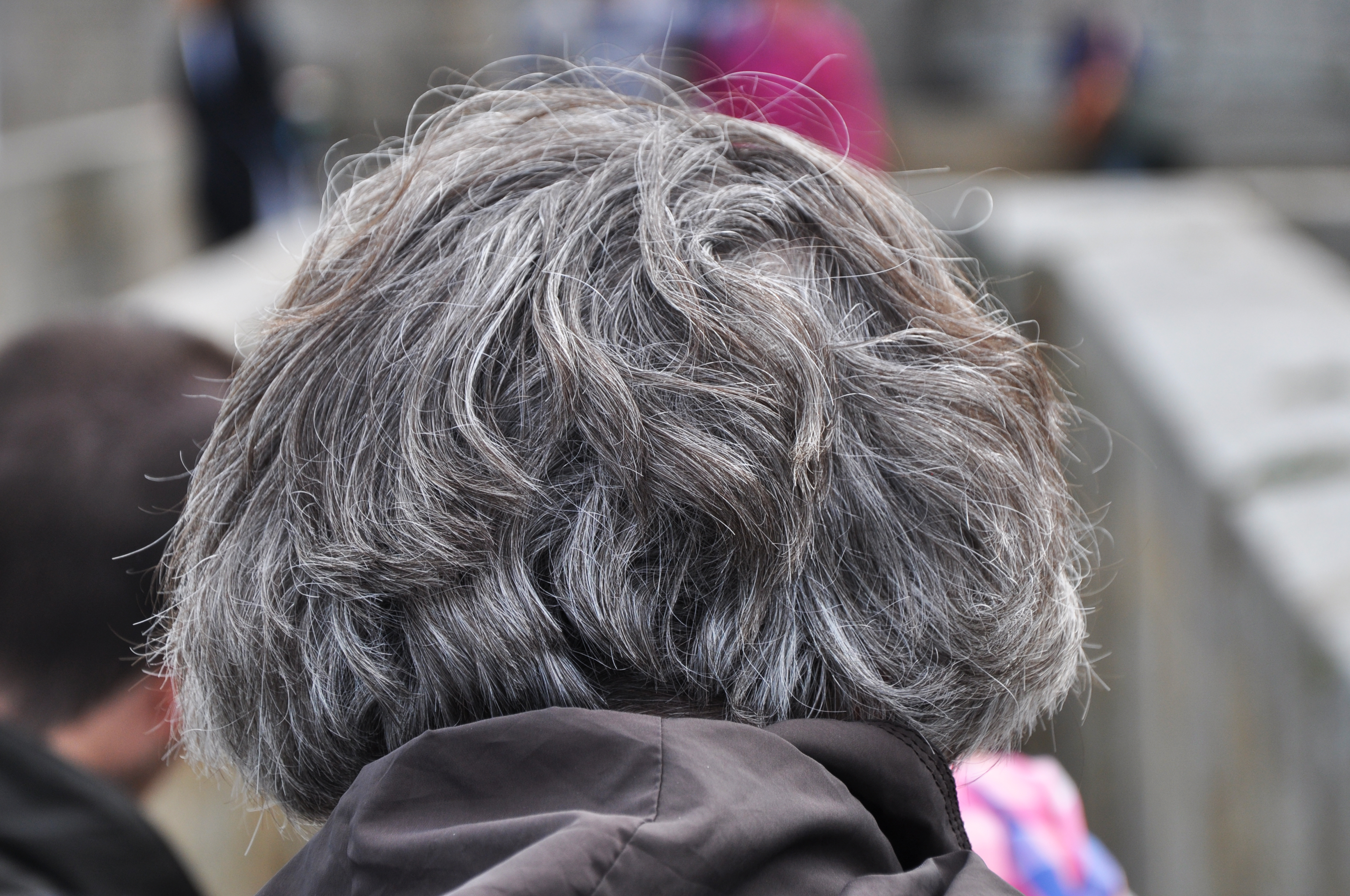 Cheveux gris sur l'arrière de la tête